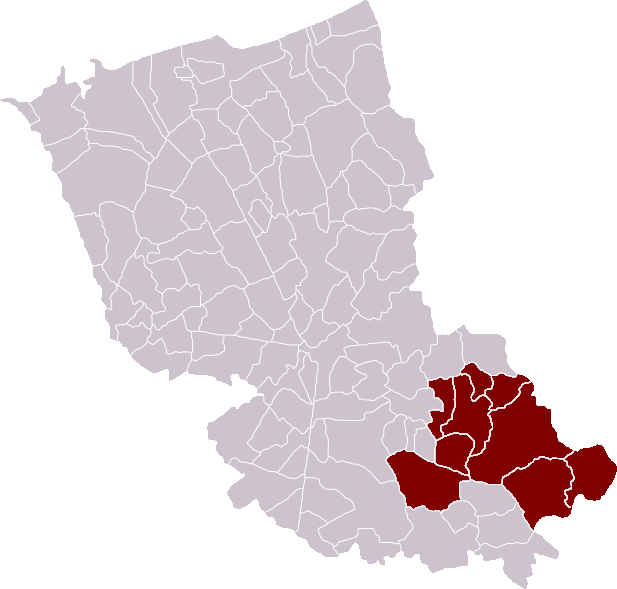 Locatie Kantons van Belle in het arrondissement Duinkerke, Frankrijk - zelfgemaakt Location Cantons of Bailleul in the Dunkirk district, France - self made Localisation Cantons de Bailleul dans l'arrondissement de Dunkerque, France - fait moi-même